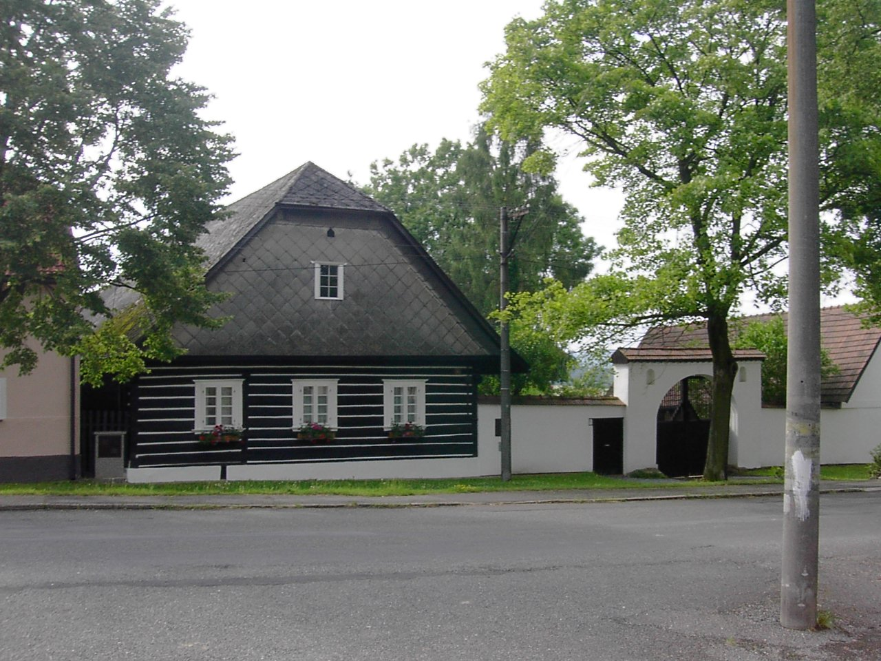 Roubená chalupa v Těškově.